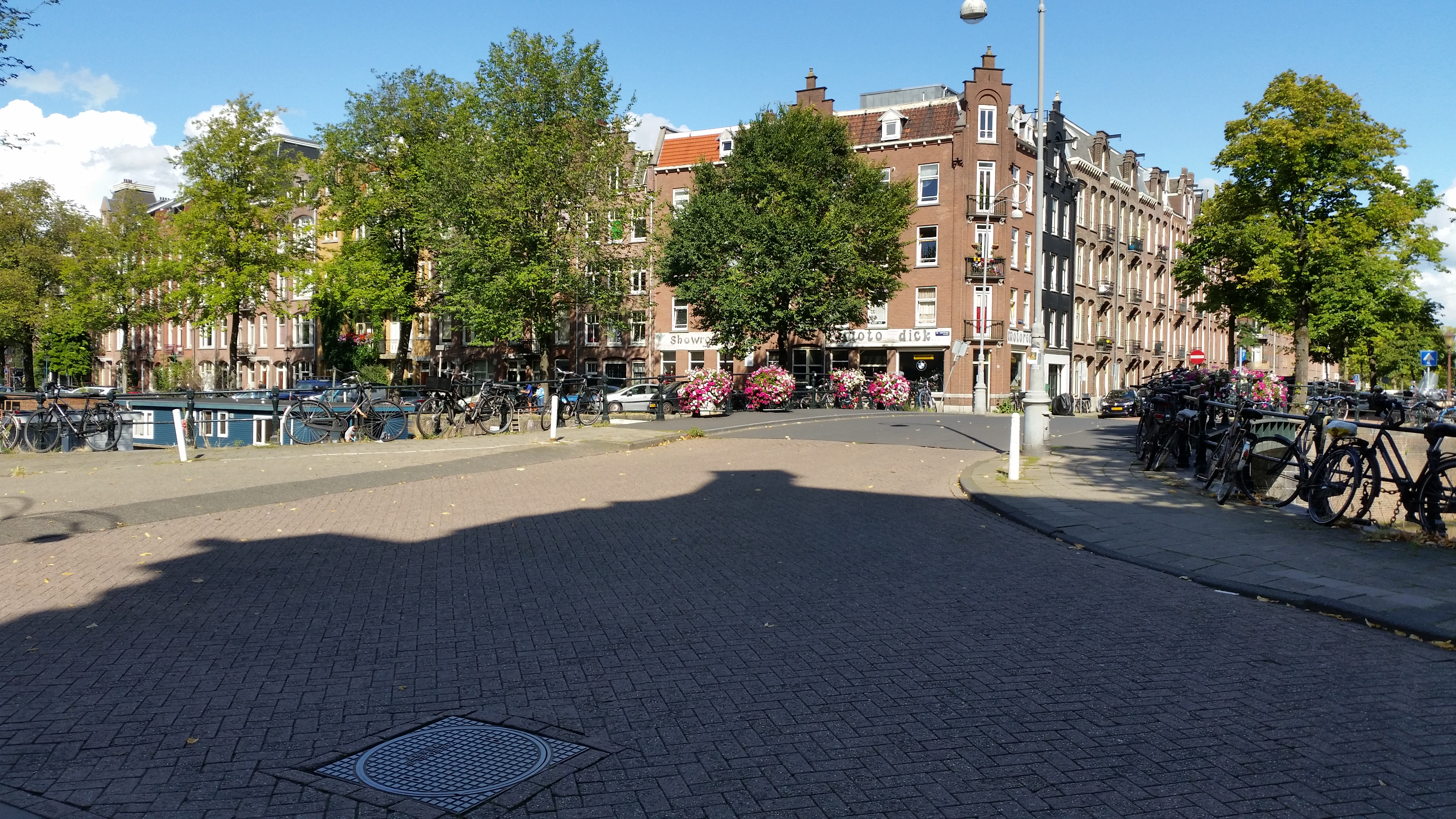 Overzicht over Brug 138, Jacobus Craandijkbrug